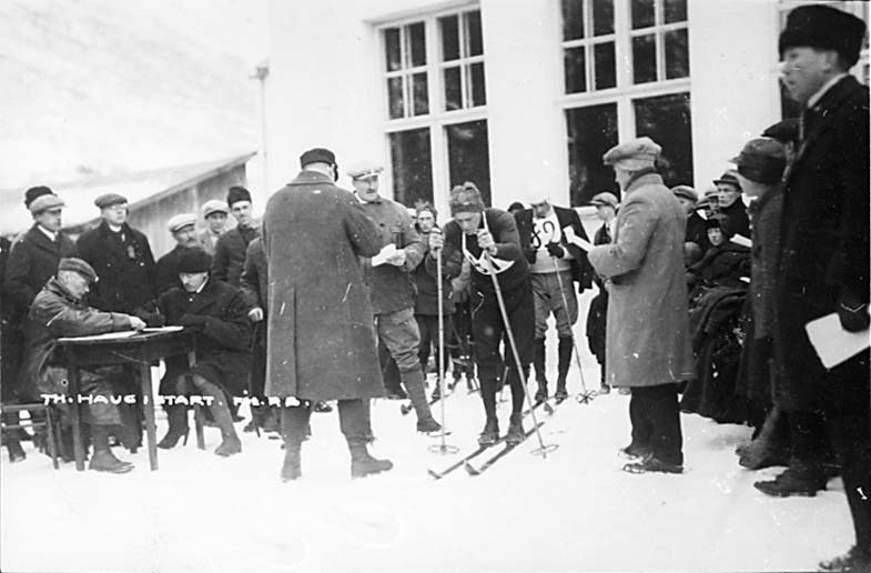 Norwegian skier Thorleif Haug